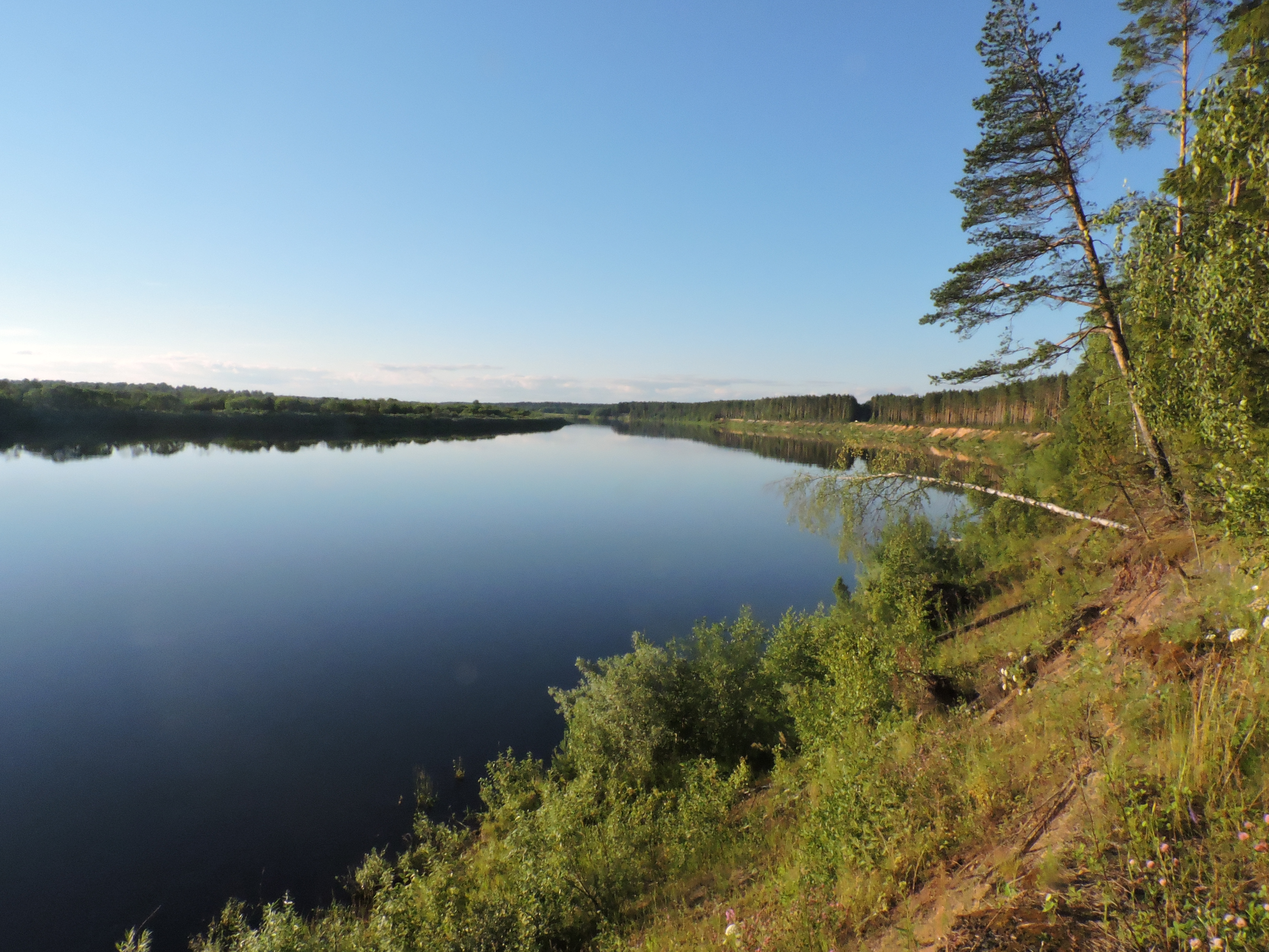 Молога за Слудами